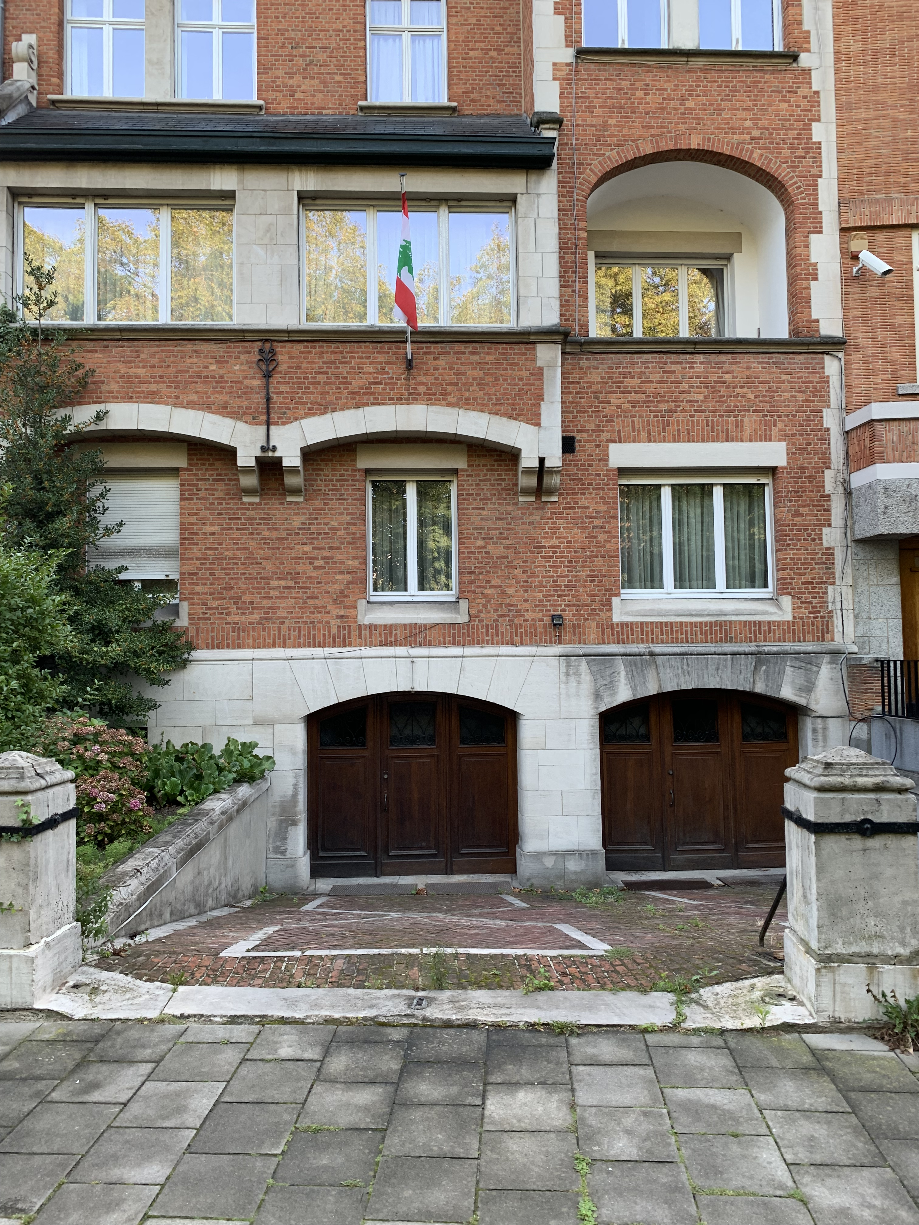 Ambassade du Liban à Bruxelles.